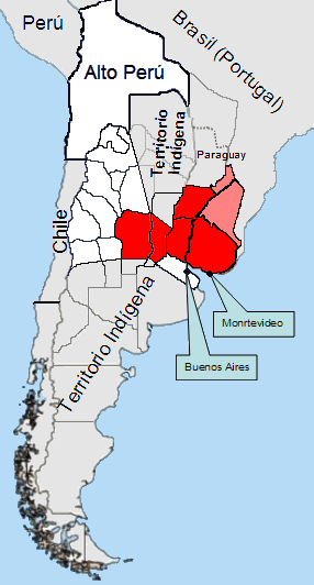 Mapa de las Provincias Unidas de Sudamérica (Río de la Plata) en 1815, con indicación de las provincias pertenecientes a la Liga Federal.